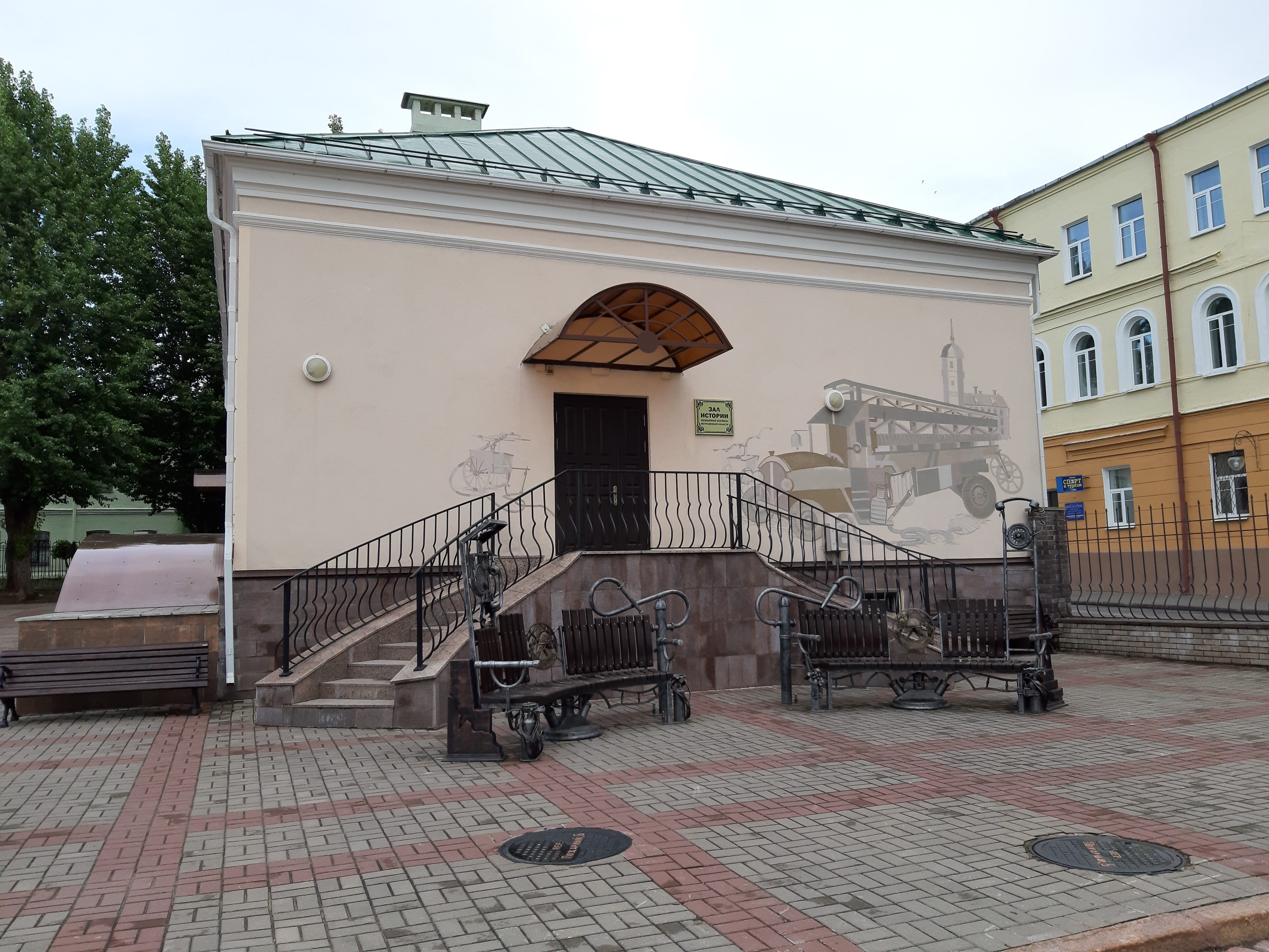 Магілёў. Двары Пажарнага завулка